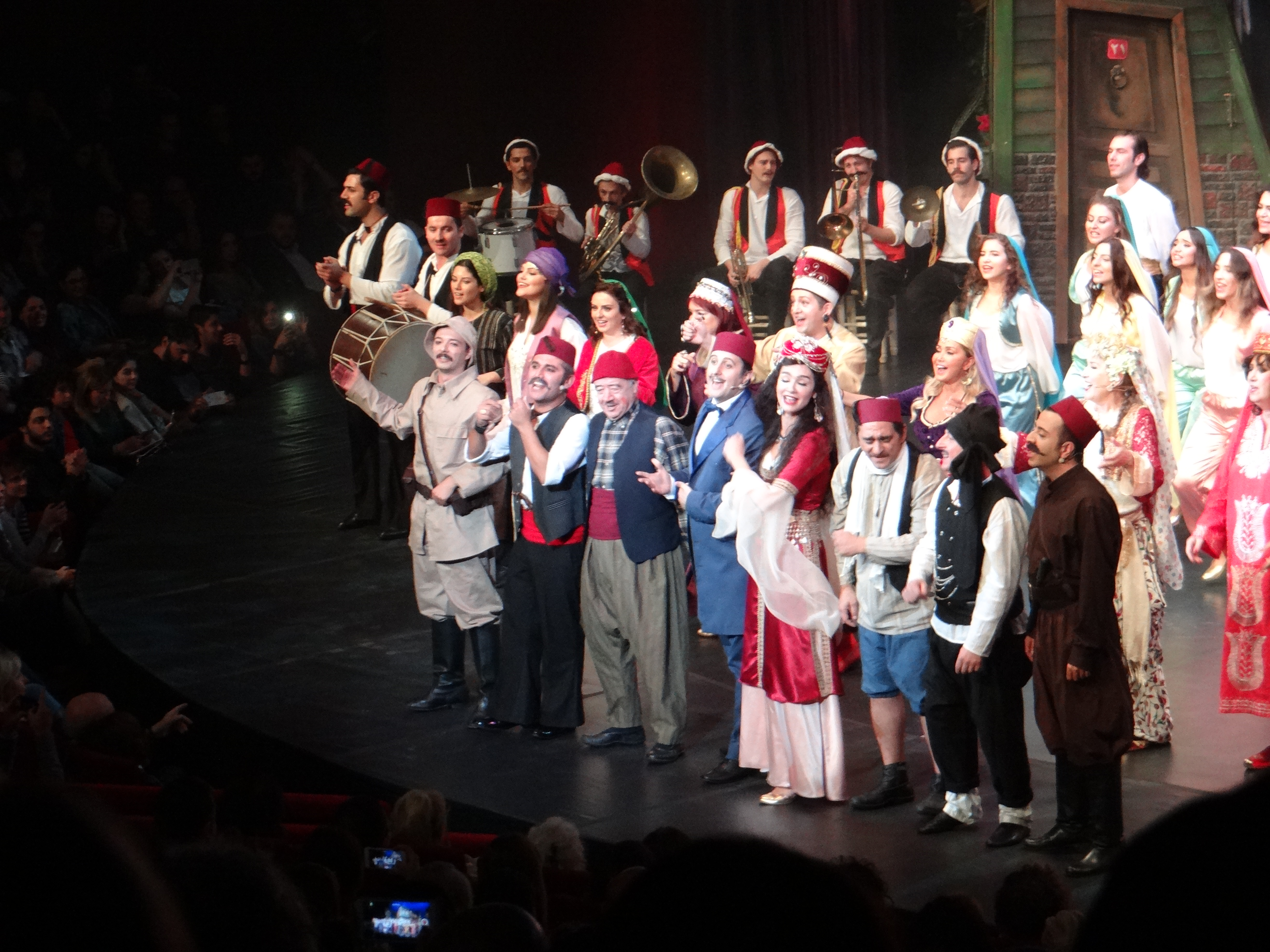 7 Kocalı Hürmüz